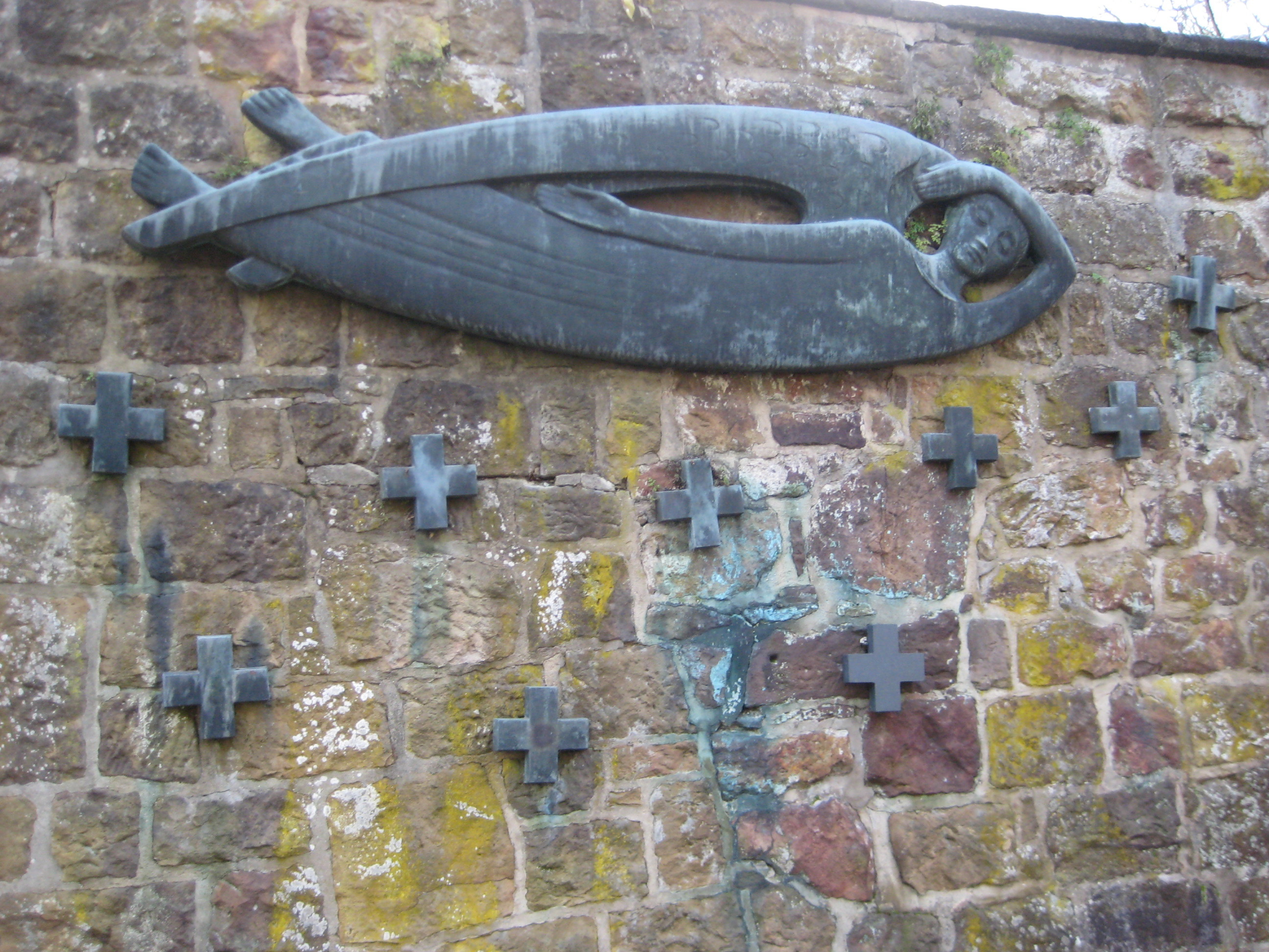 Kriegerehrenmal von Fritz Szalinsky an der Stelle der ehemaligen Legge des Iburger Schlosses